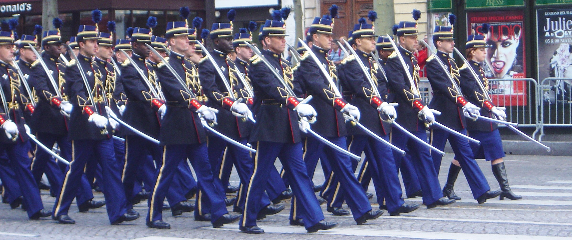 Je pense qu'il s'agit d'élèves de l'École des officiers de la Gendarmerie Nationale (France)